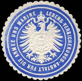 Sealing stamp Title: Lebens - Versicherungs - Anstalt für die Armee und Marine Description: blau, weiß, geprägt Place: size: 4 cm